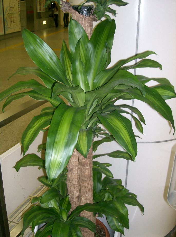 Dracaeana fragrans 'Massangeana'